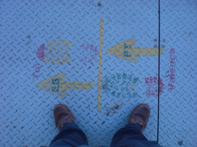 Esperantisto sur landlimo inter Hispanio kaj Portugalio